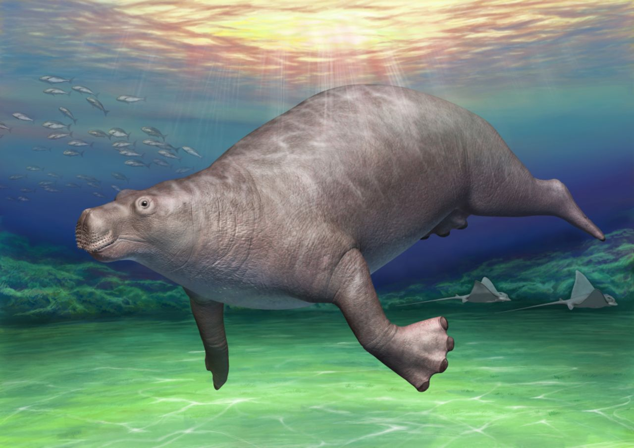 Life reconstruction of Paleoparadoxia from Tsuchiyu Onsen Town. This artistic image was constructed based on a combination of photogrammetric 3D models of original skeletal fossils by using PhotoScan v. 1.4.0, including EESUT-PV-0001, and designed models of missing parts. This image gives more accurate proportion of Paleoparadoxia than ever reconstructed for the animal.